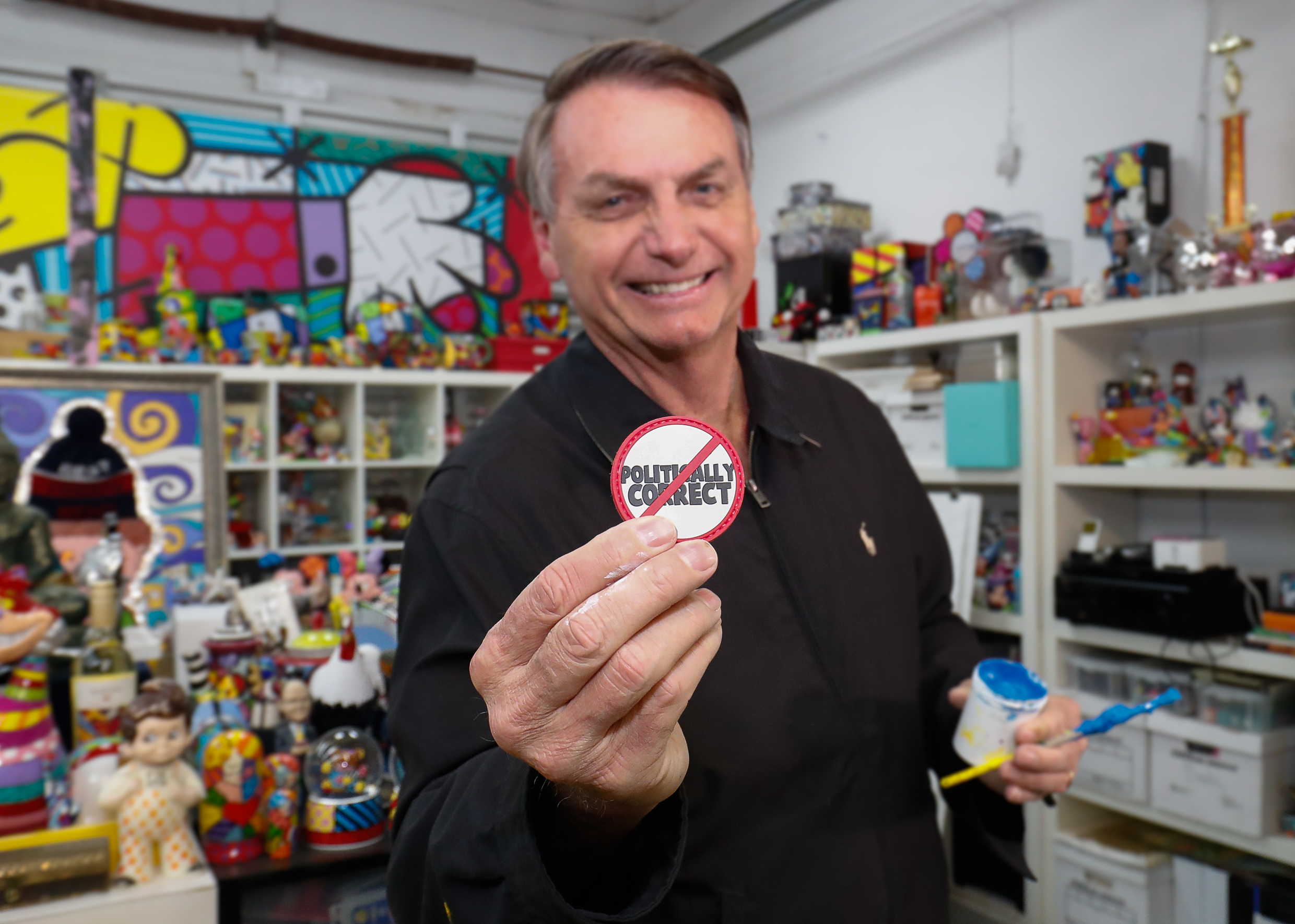 (Miami - Flórida, 08/03/2020) Presidente da República Jair Bolsonaro acompanhado da Primeira-Dama Michelle Bolsonaro, visitam o Estúdio do Artista Romero Britto. Foto: Alan Santos/PR